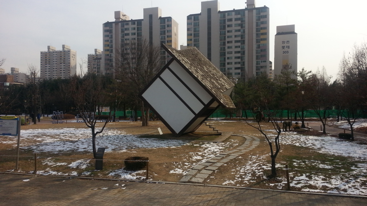 평촌중앙공원 티하우스